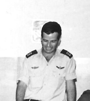 רס"ן אורי גולני מפקד רס סודר